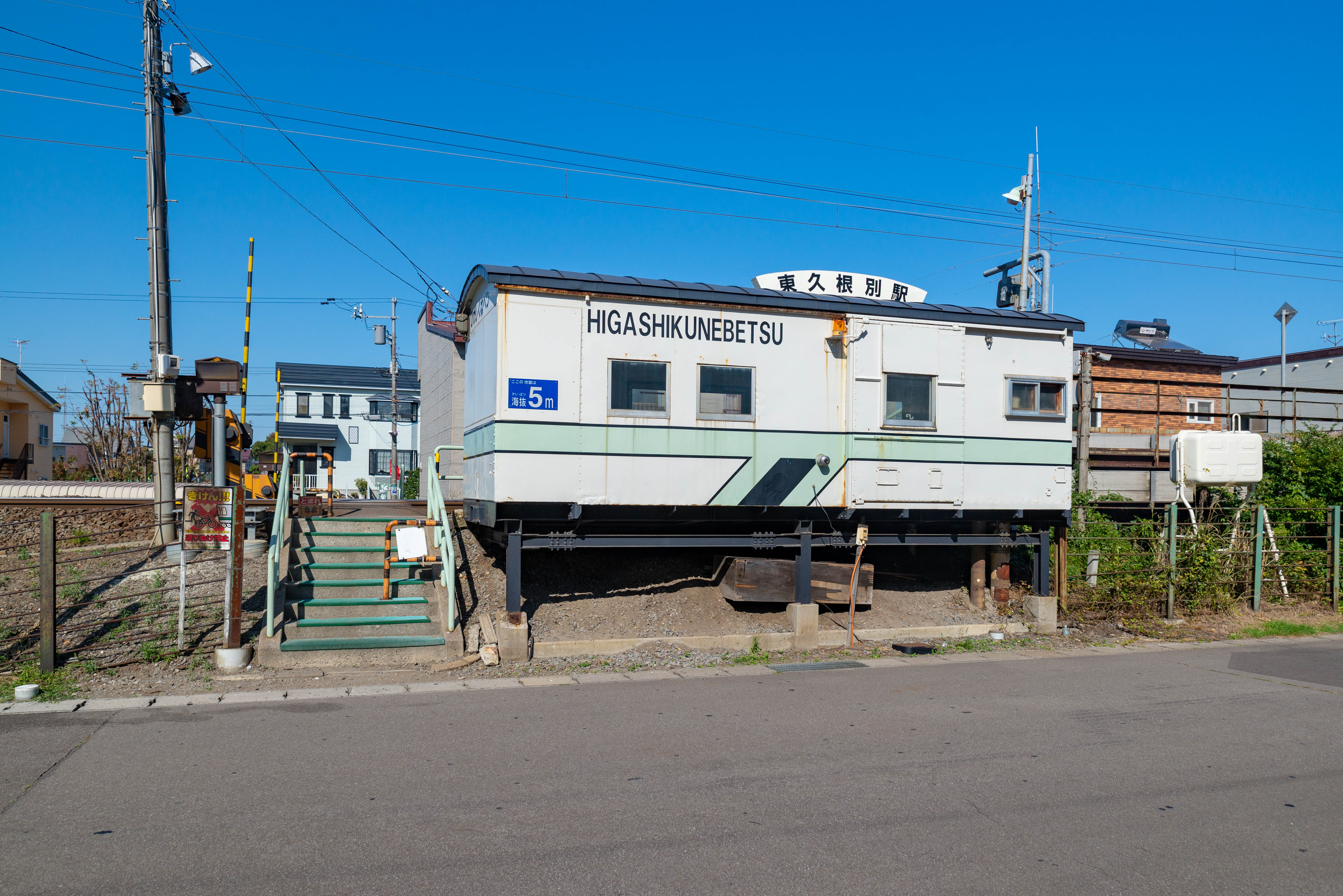 道南いさりび鉄道東久根別駅駅舎 （北海道旅客鉄道株式会社江差線東久根別駅駅舎）